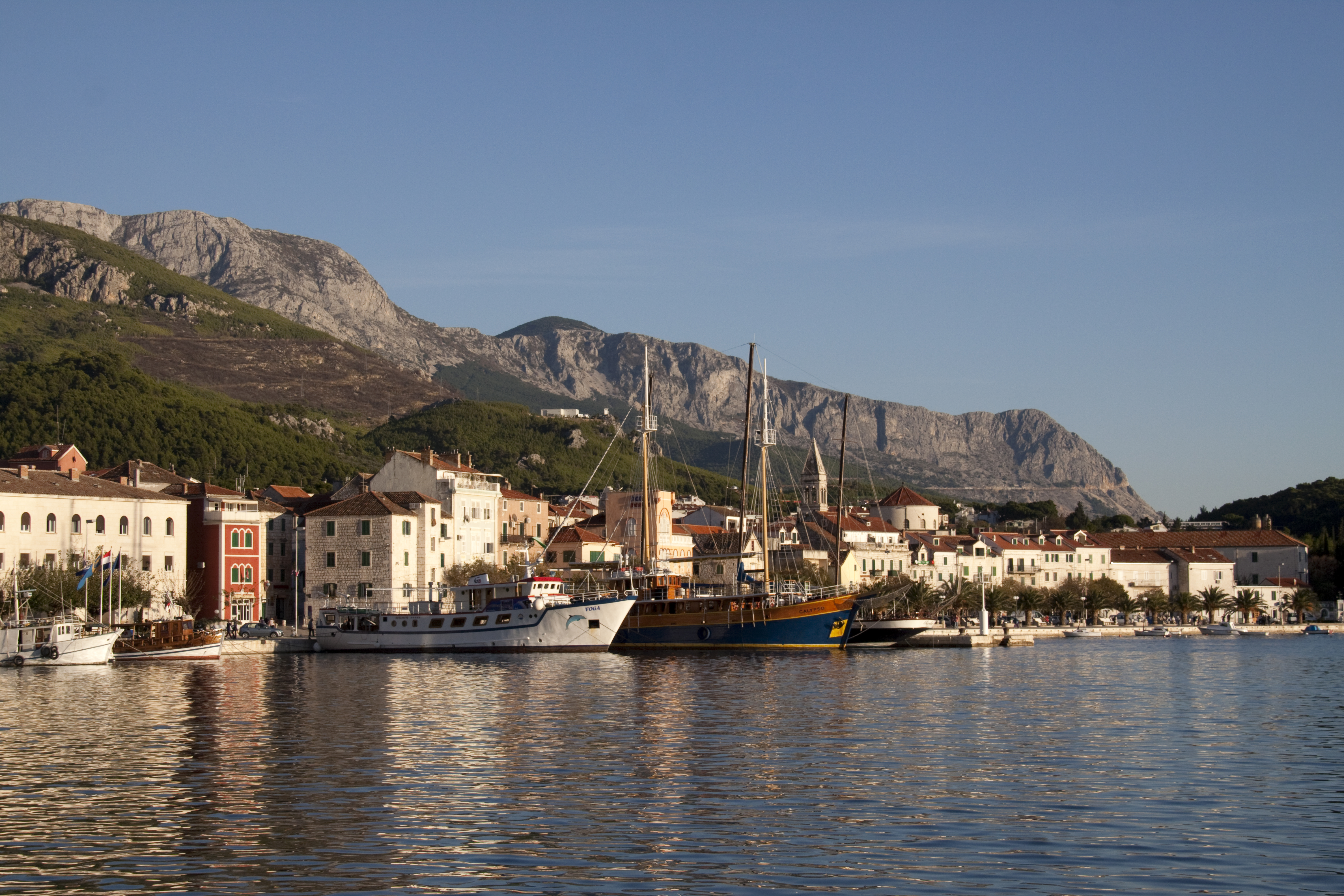 Makarska Harbour 4